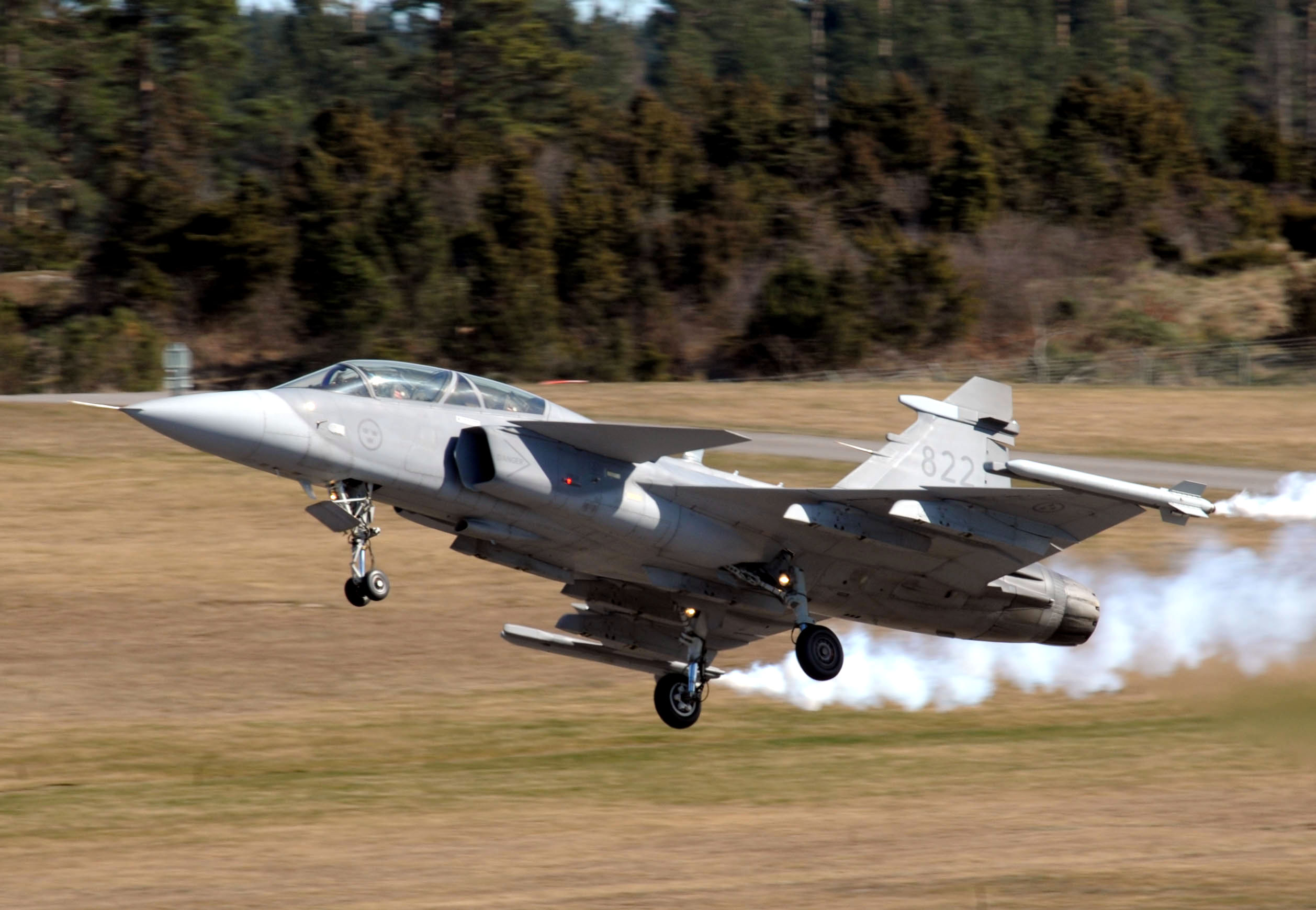 03/04/2014, Suécia Fotos: Jorge Cardoso